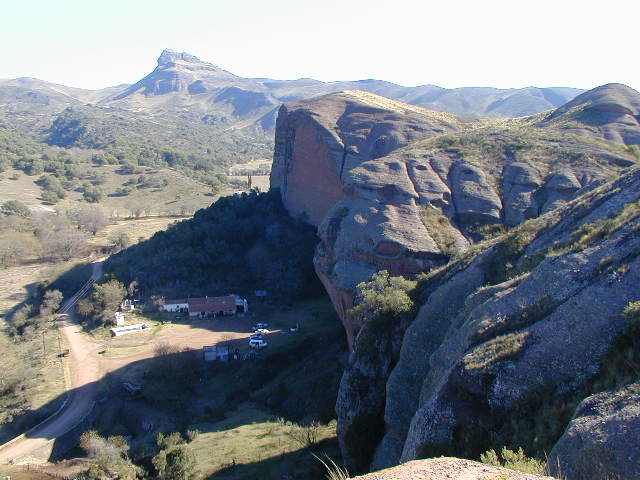 Esta imagen muestra la zona Oeste del Valle de Ongamira. Ongamira, Córdoba, Argentina